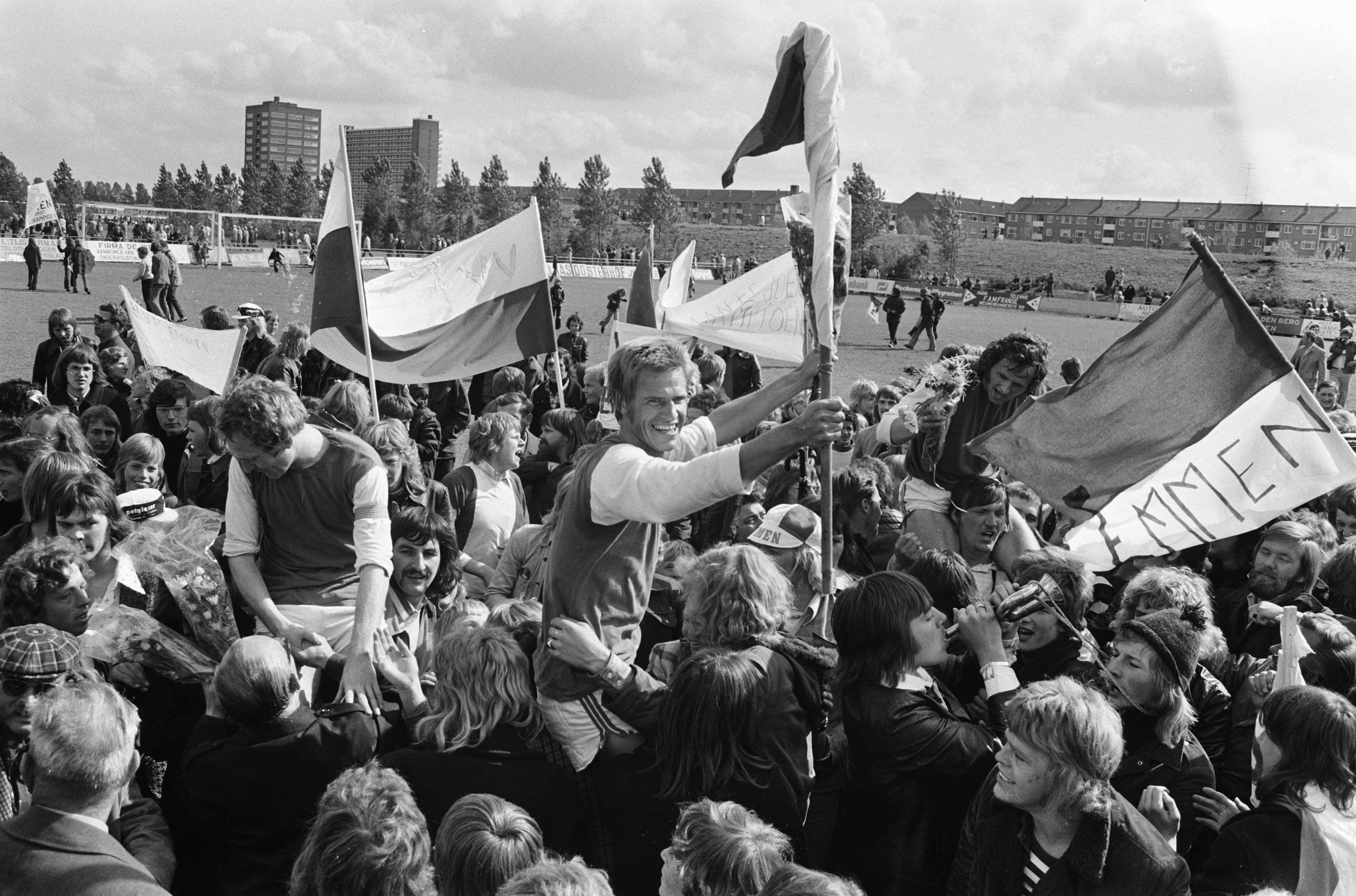 Huldiging van Emmen, in het midden Meijerink